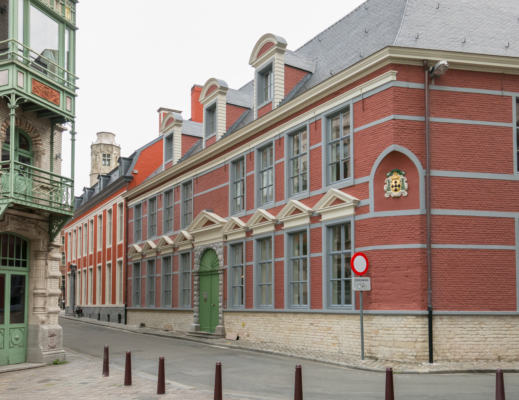 Bisschoppelijk Seminarie (Gent), gevel met wapenschild van Mgr. Maximiliaan Antoon van der Noot.